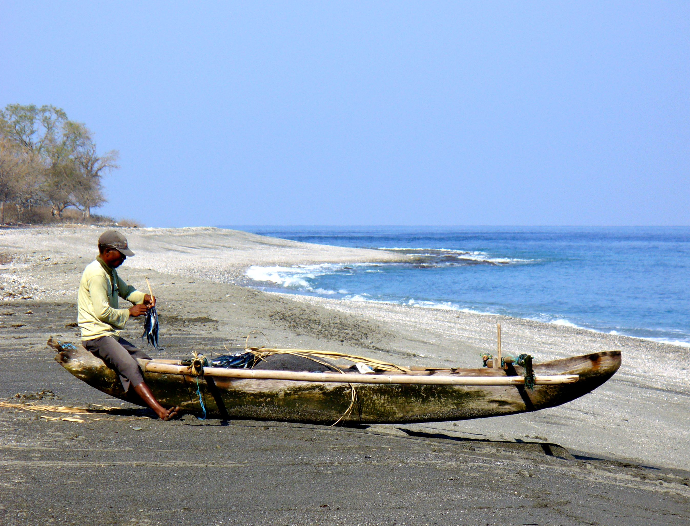 Maubara, East Timor